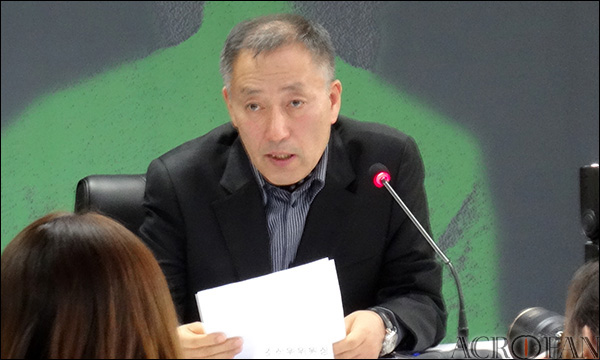 일본군위안부 한국만화기획전 개최 기자간담회